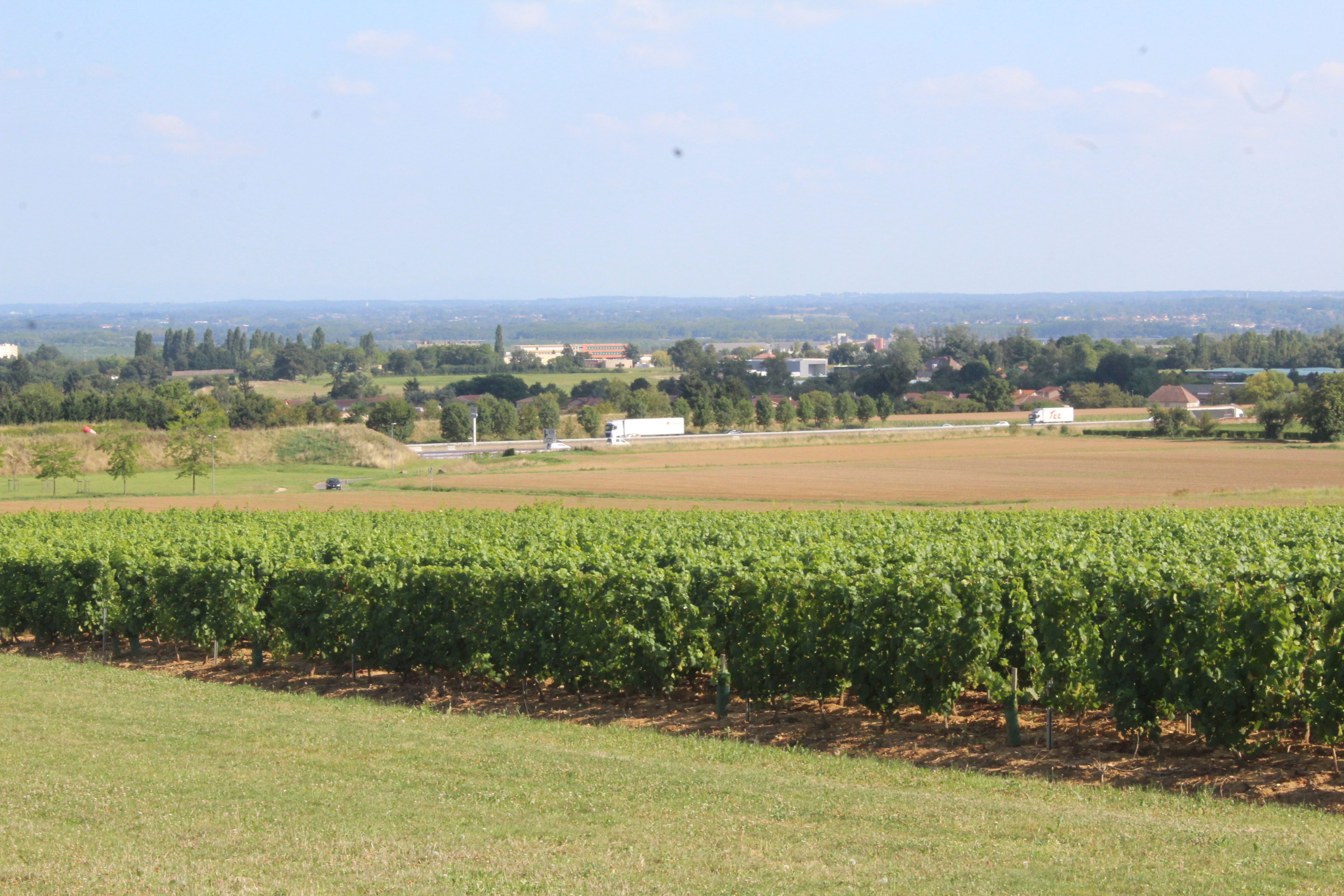 Parcelle de vignes à Charnay-lès-Mâcon près du domaine de Champgrenon.